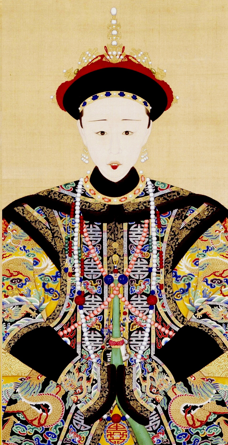 孝全成皇后朝服像 Height: 241 cm (94.8 in); Width: 113.4 cm (44.6 in)